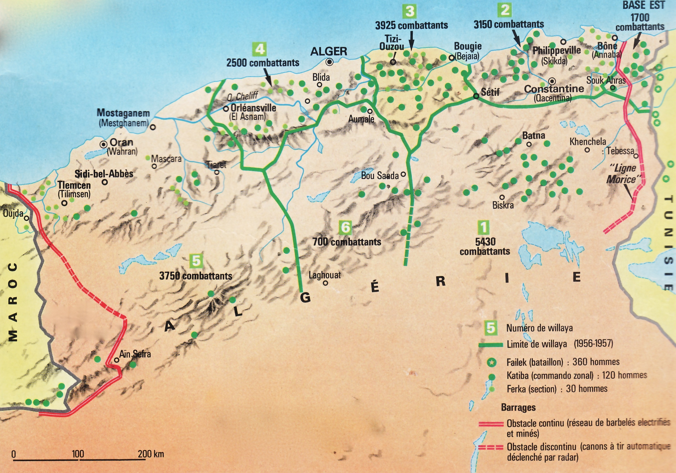 Carte du découpage du territoire algérien en 6 wilayas élaboré lors du congrès de la Soummam en 1956